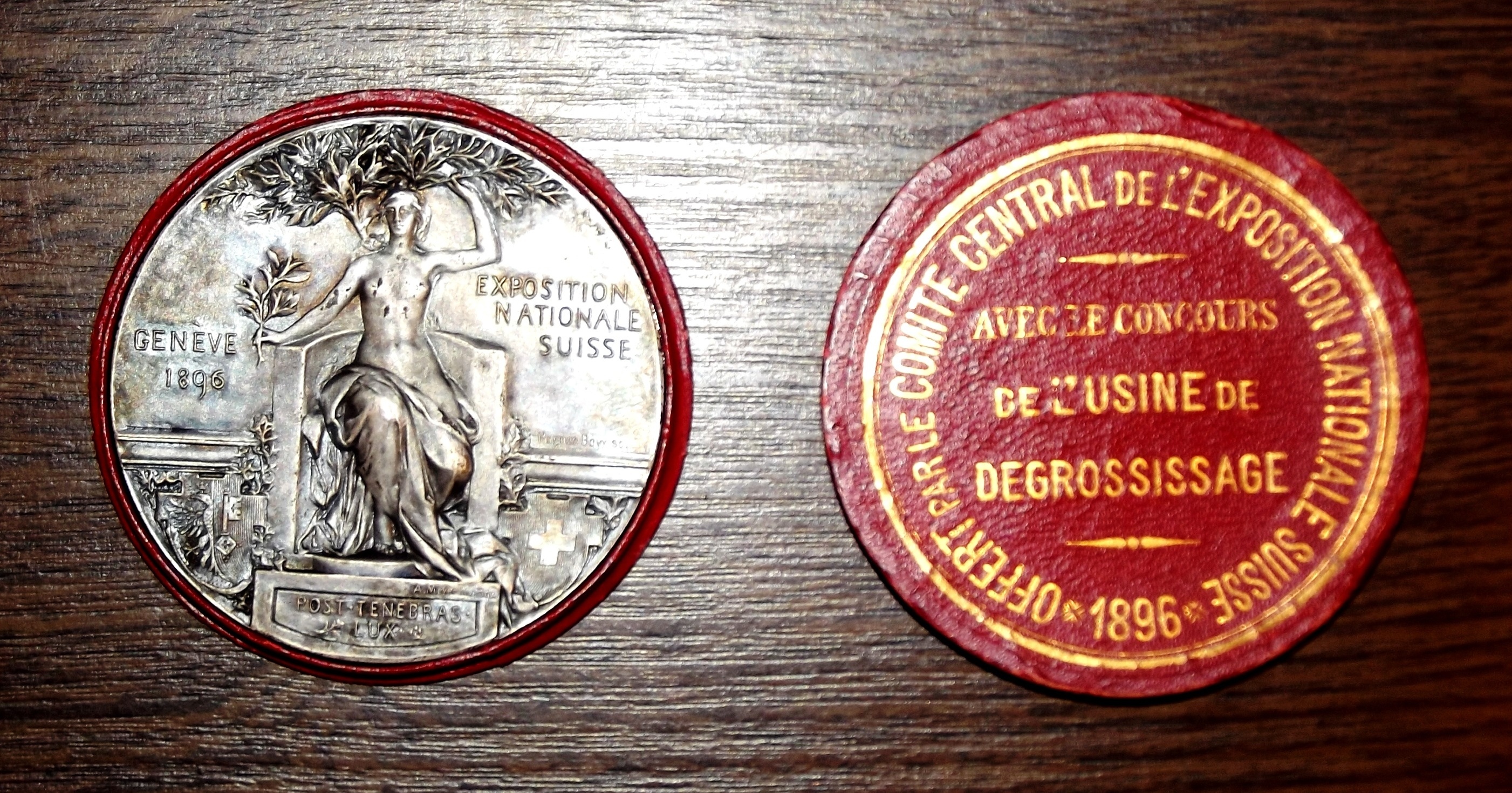 Médaille en argent offerte à la Société genevoise d'utilité publique (SGUP) lors de l'Exposition nationale de 1896. Conservée aux Archives d'État de Genève.